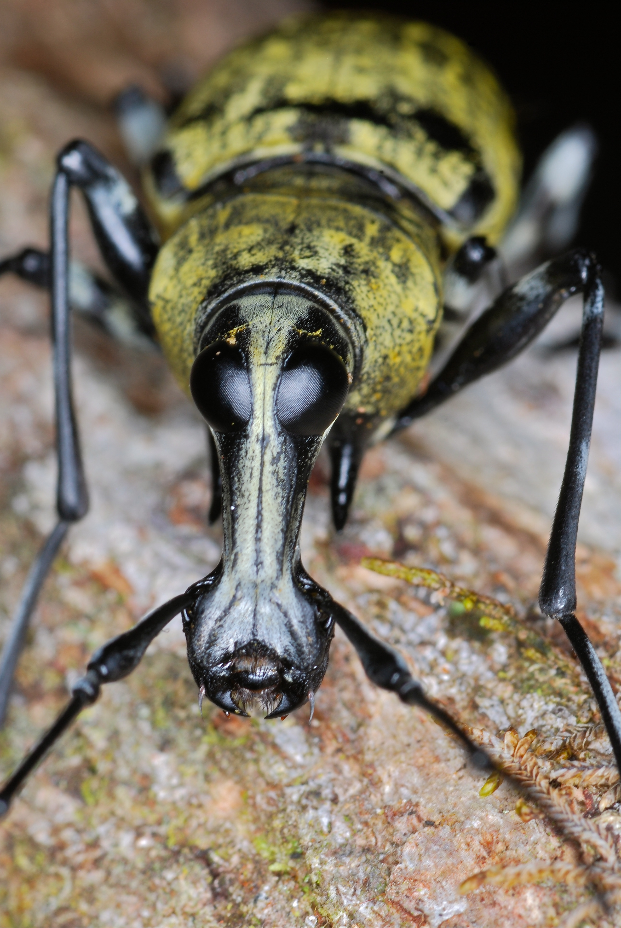 Tapah Hills, Perak, MALAYSIA